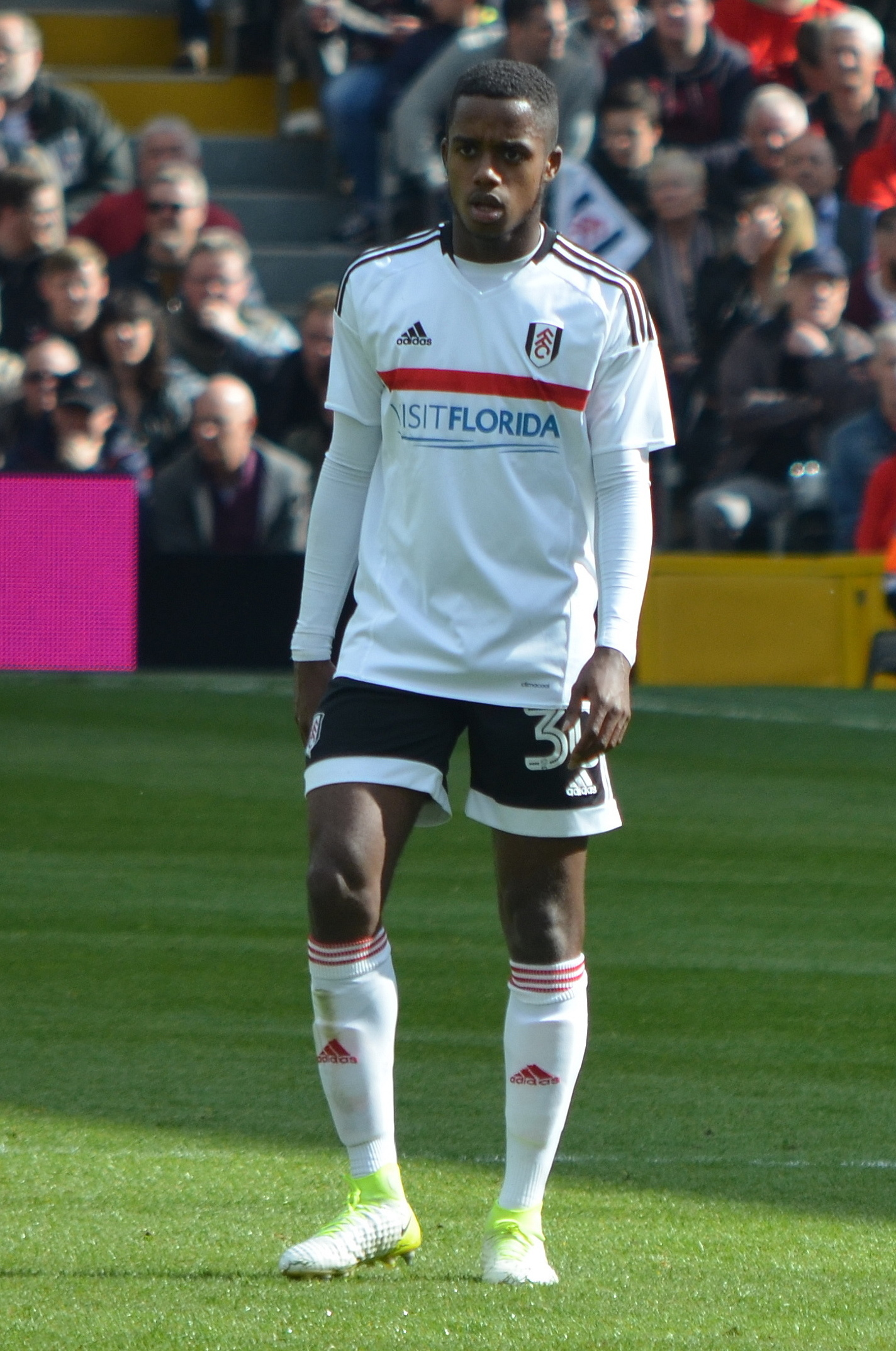 Ryan Sessegnon, Fulham FC